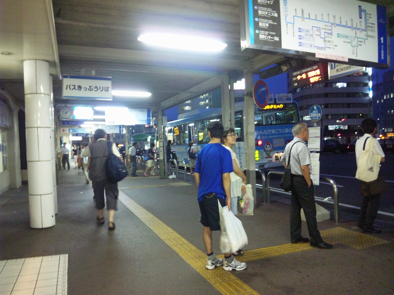 近鉄四日市駅西バスのりば